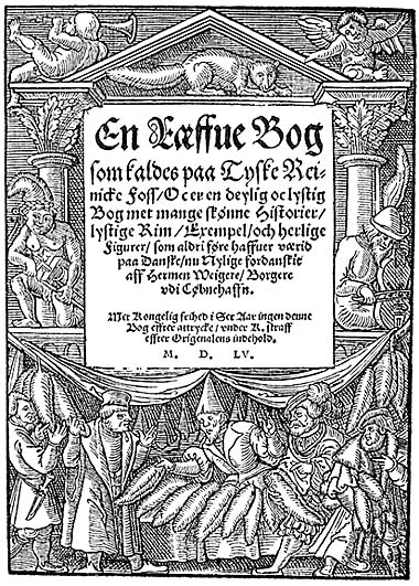 Titelblad fra En Ræffue Bog i den oprindelige udgave fra 1555.